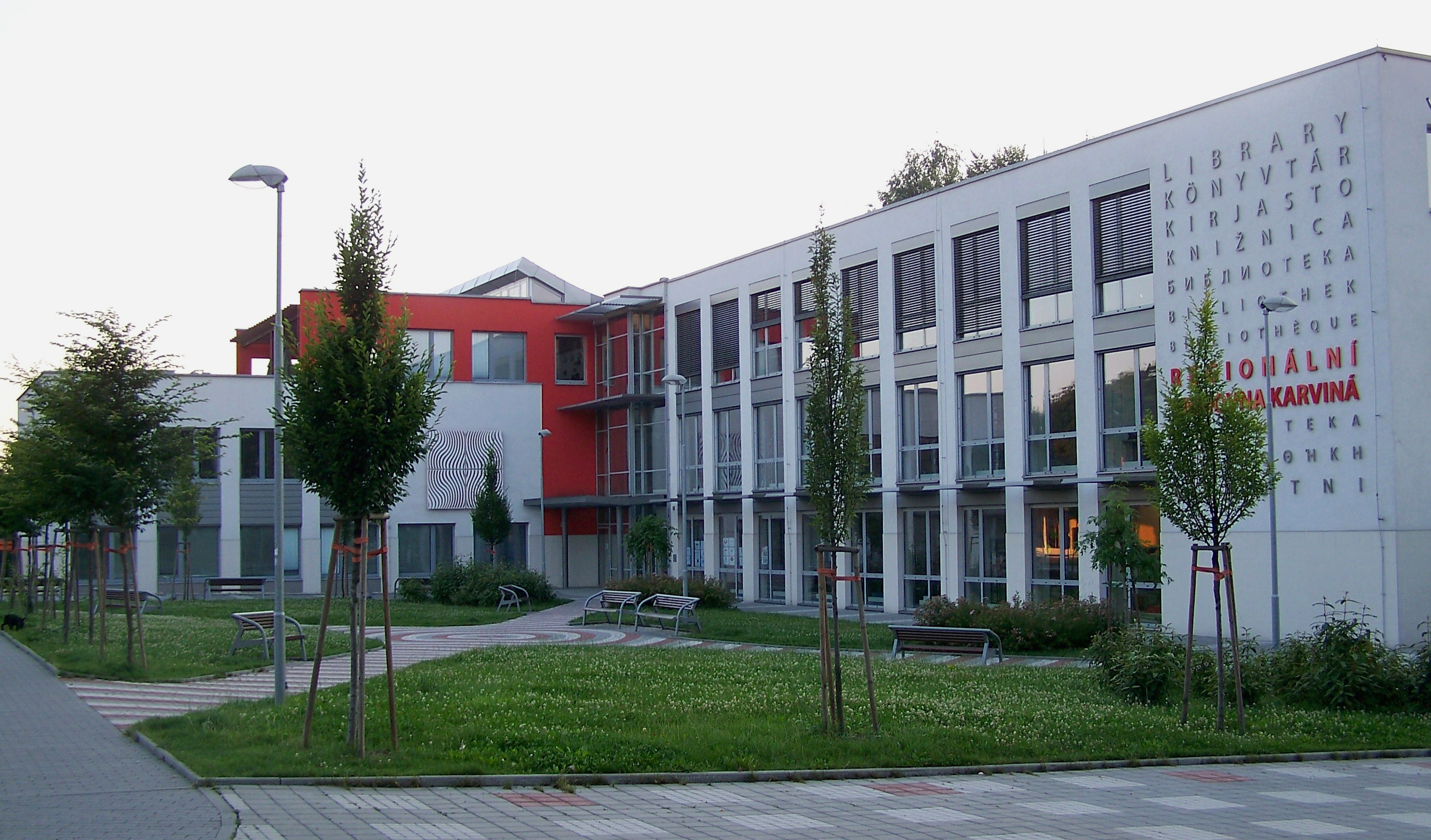 Nová budova regionální knihovny v Karviné-Mizerově.